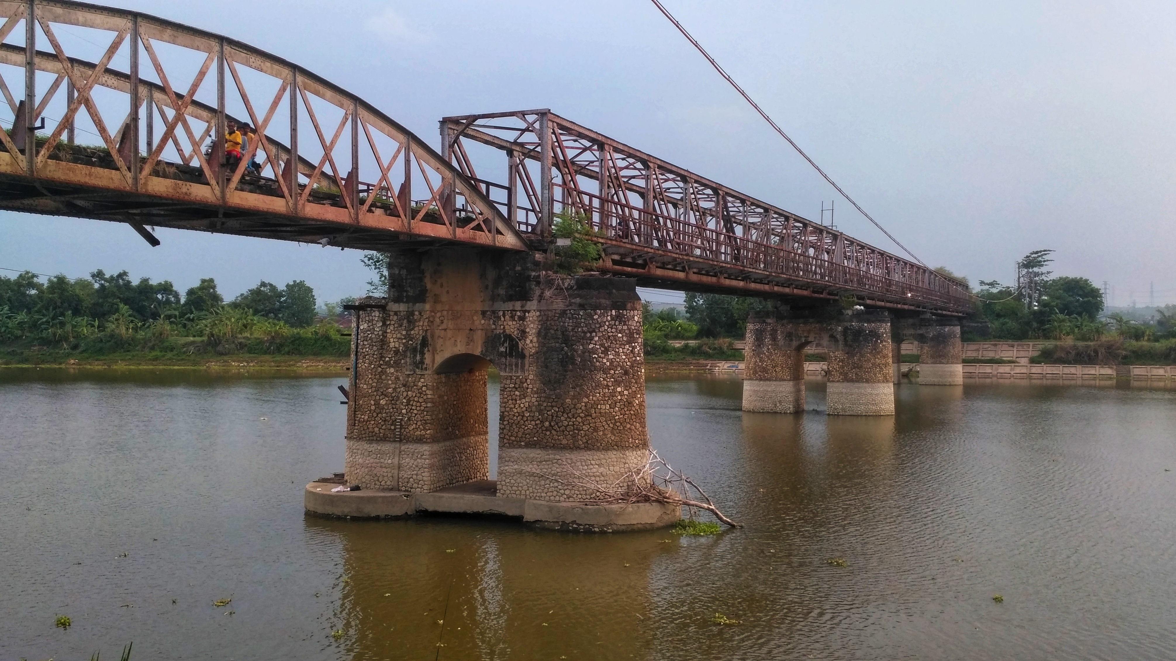 Bekas jembatan kereta api Cincim yang berada di atas Sungai Bengawan Solo yang menghubungkan Stasiun Babat sampai Stasiun Tuban dan Merakurak yang telah dinonaktifkan. Saat ini jembatan ini dimanfaatkan oleh warga setempat menjadi jembatan penyeberangan dengan cara menempatkan balok-balok kayu besar pada rangka jembatan yang diikatkan dengan kawat besar. Sasaran jembatan ini biasa digunakan oleh para pejalan kaki, pengendara sepeda onthel dan sepeda motor yang akan menuju Babat, Tuban, dan Bojonegoro.